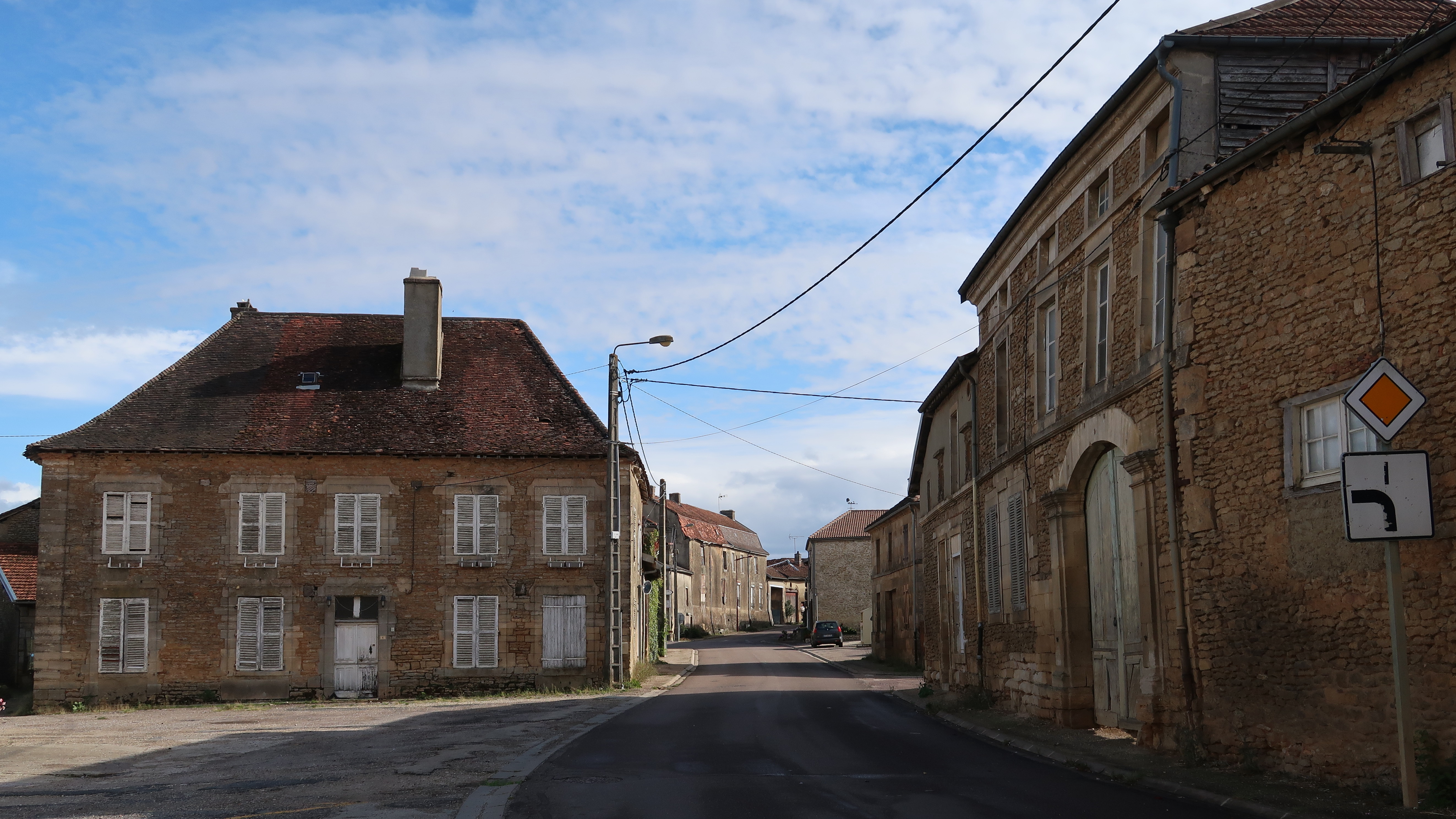 Nully, Grande rue, ancienne nationale 60.